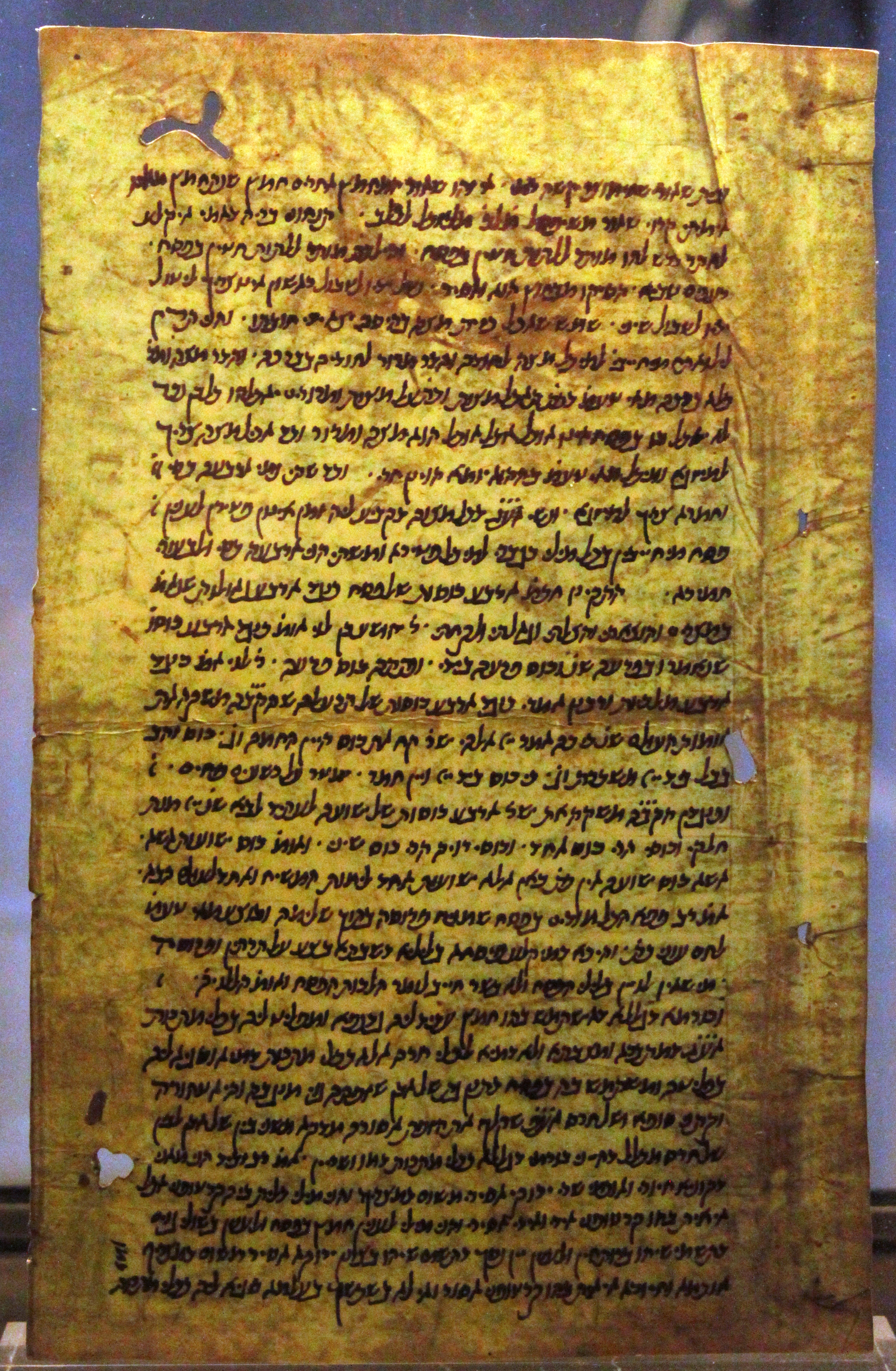 Facsimile di un frammento del Talmud di Gerusalemme, dipinto su carta, conservato presso il Museu d'Història dels Jueus di Girona (Spagna)